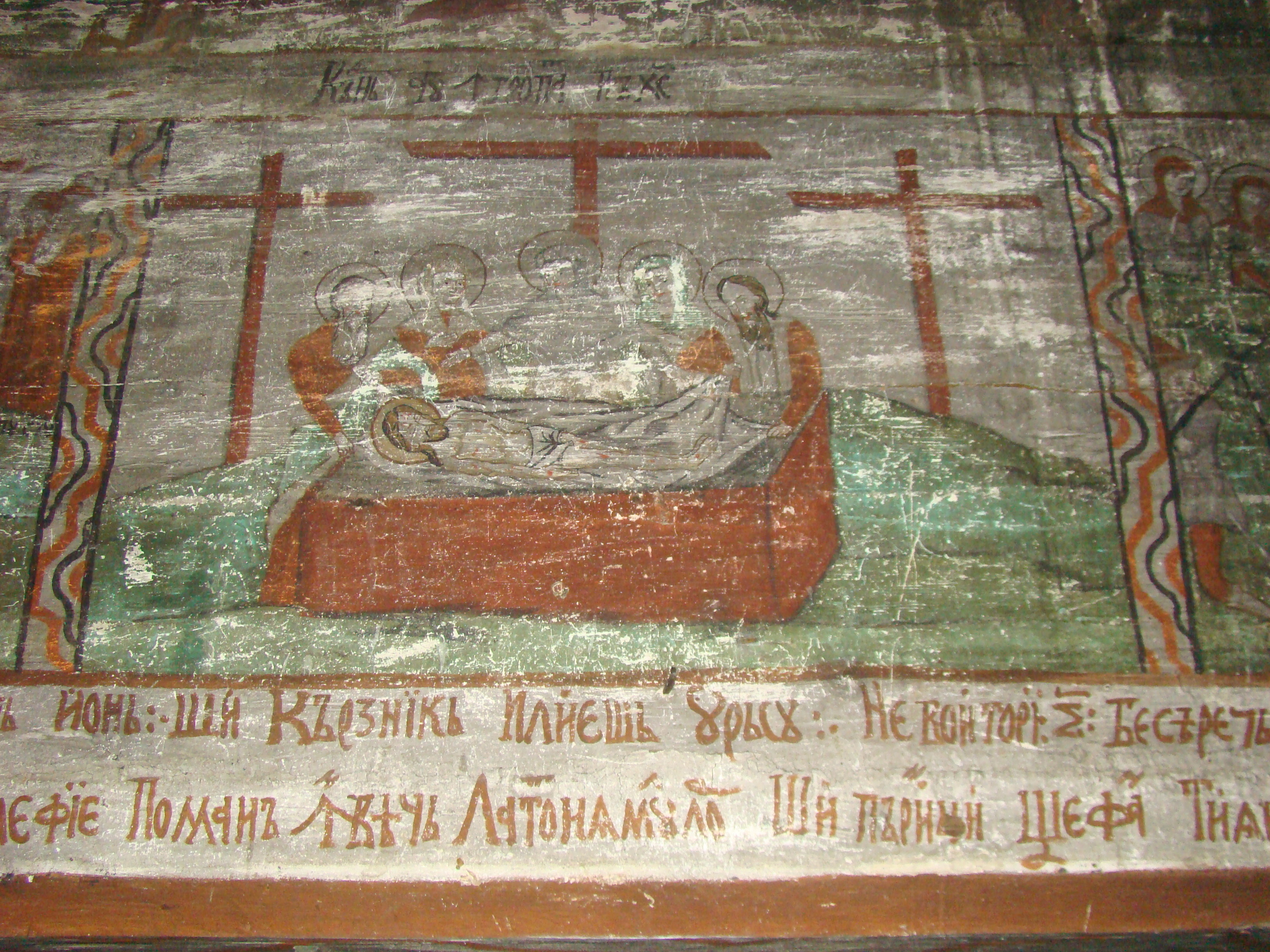 Biserica de lemn "Cuvioasa Paraschiva" , sat POIENILE IZEI